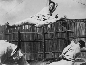 Hapkido beoefenaar voert gesprongen schaartrap uit. Foto komt uit het persoonlijk fotoalbum van mijn leraar en is geplaatst met zijn toestemming.